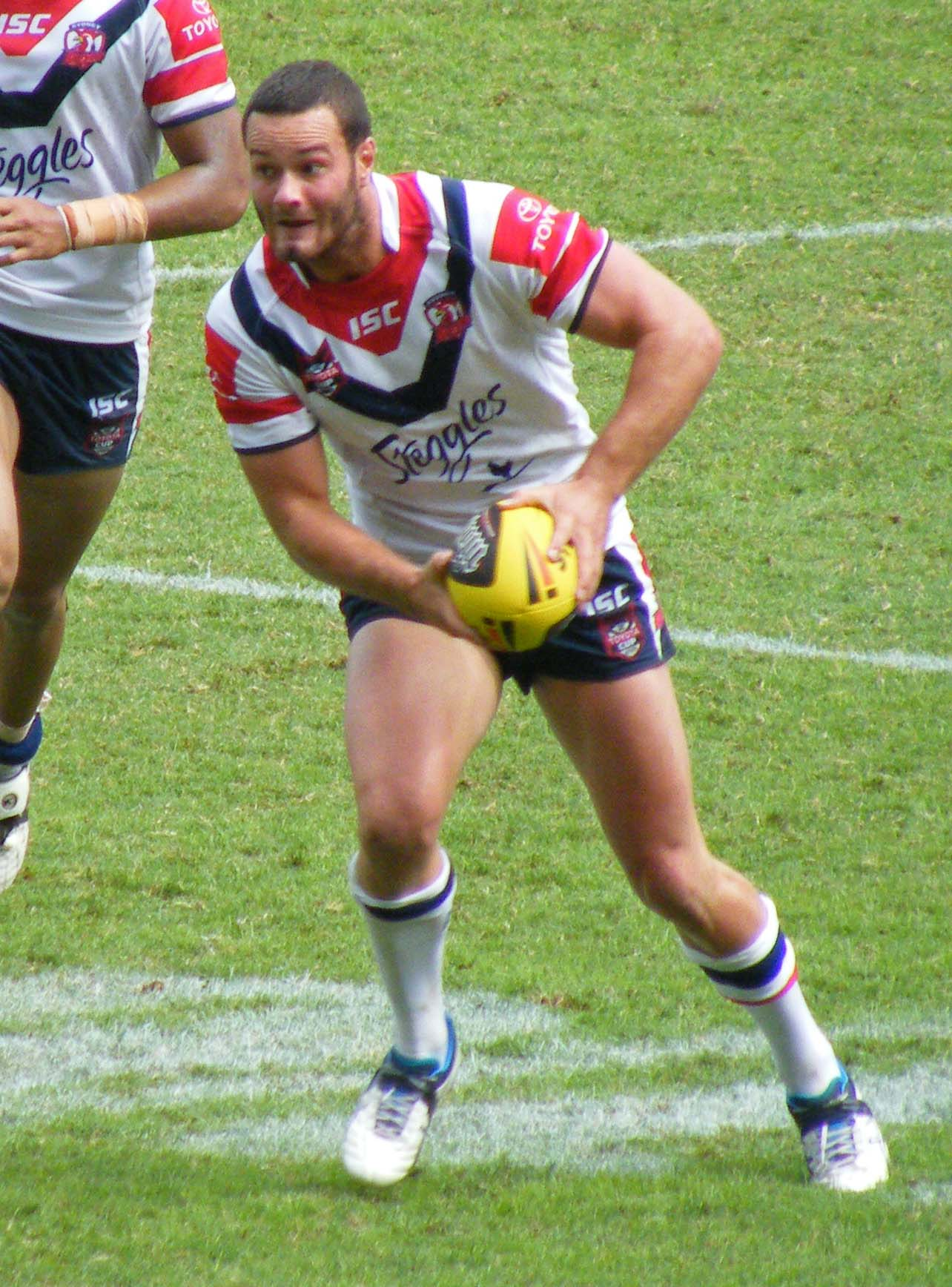 Boyd cordner